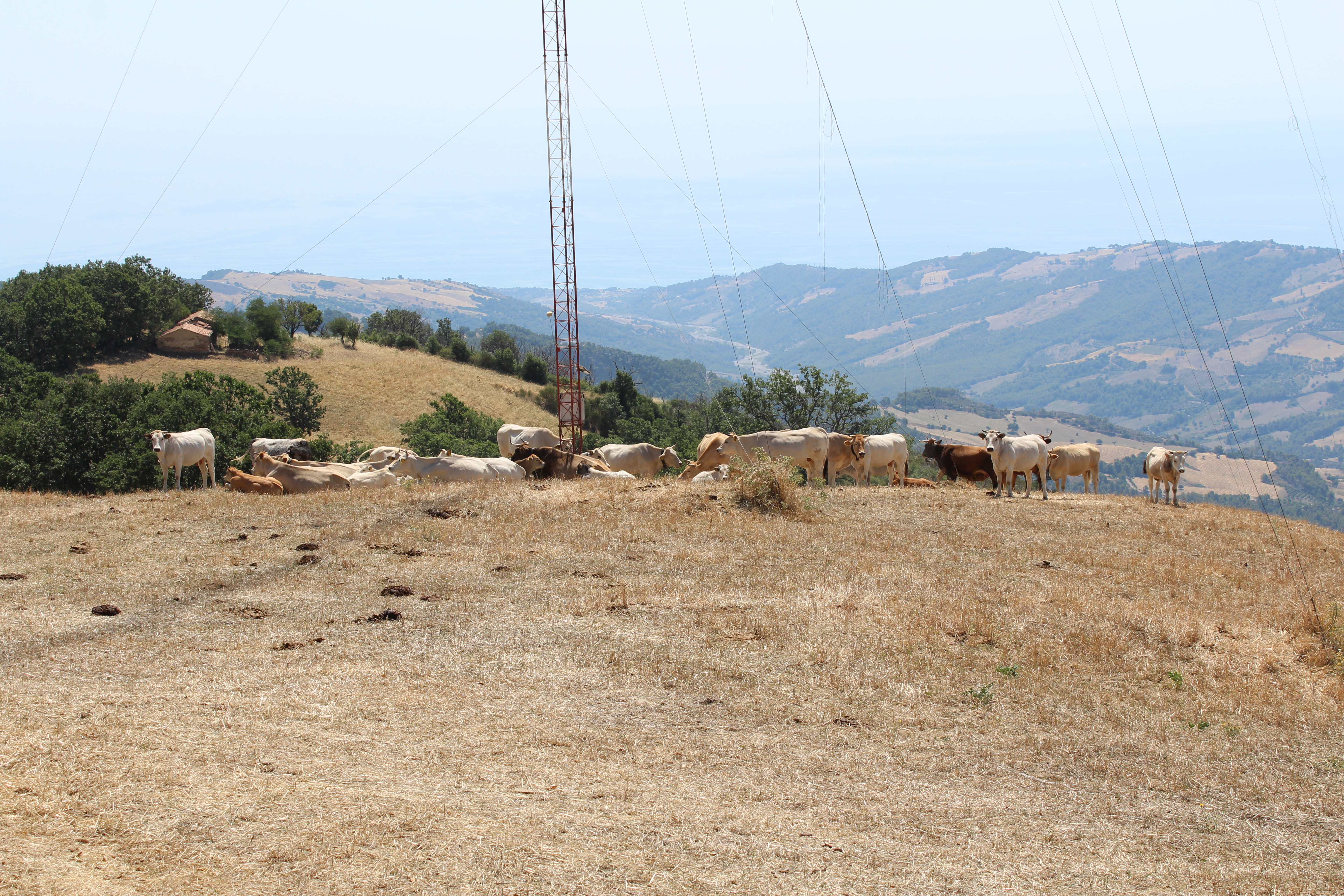 Mucche al pascolo al Manganile